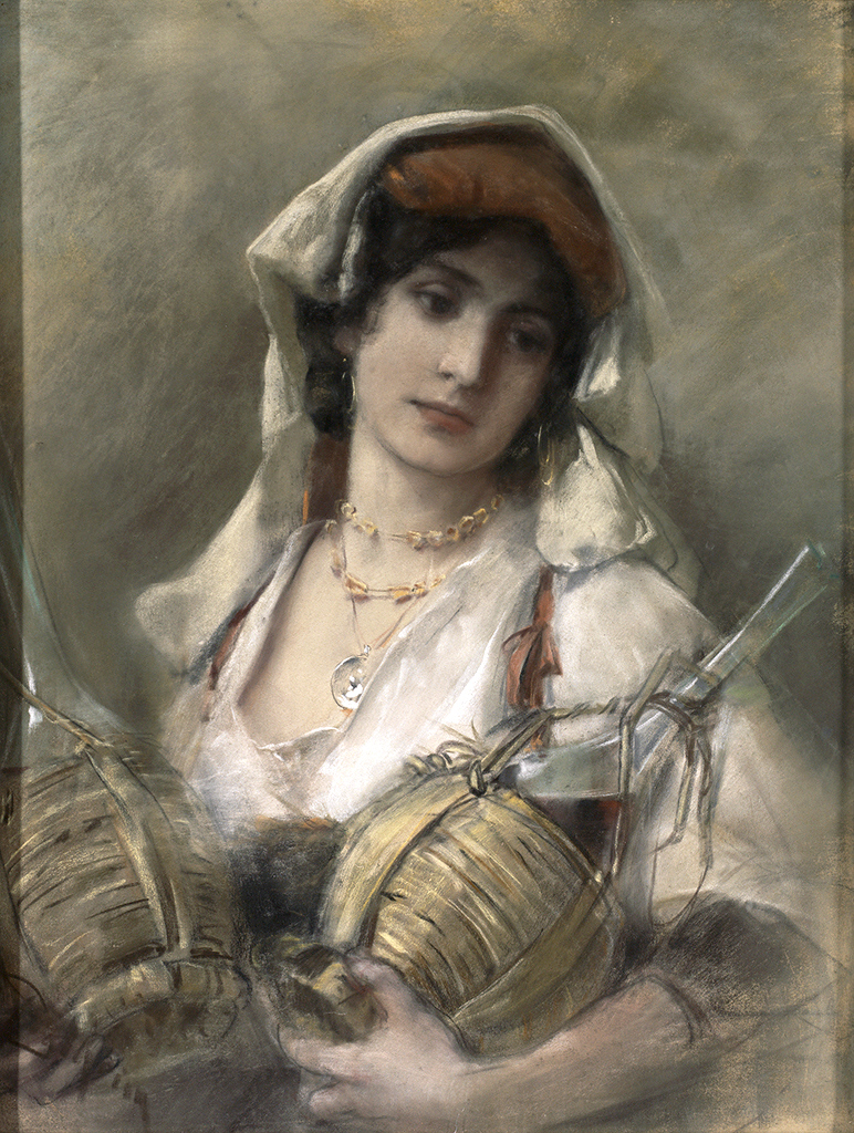 Portrait eines Mädchens aus den Albaner Bergen mit zwei Chiantiflaschen. Pastell. 78 x 58 cm. Signiert